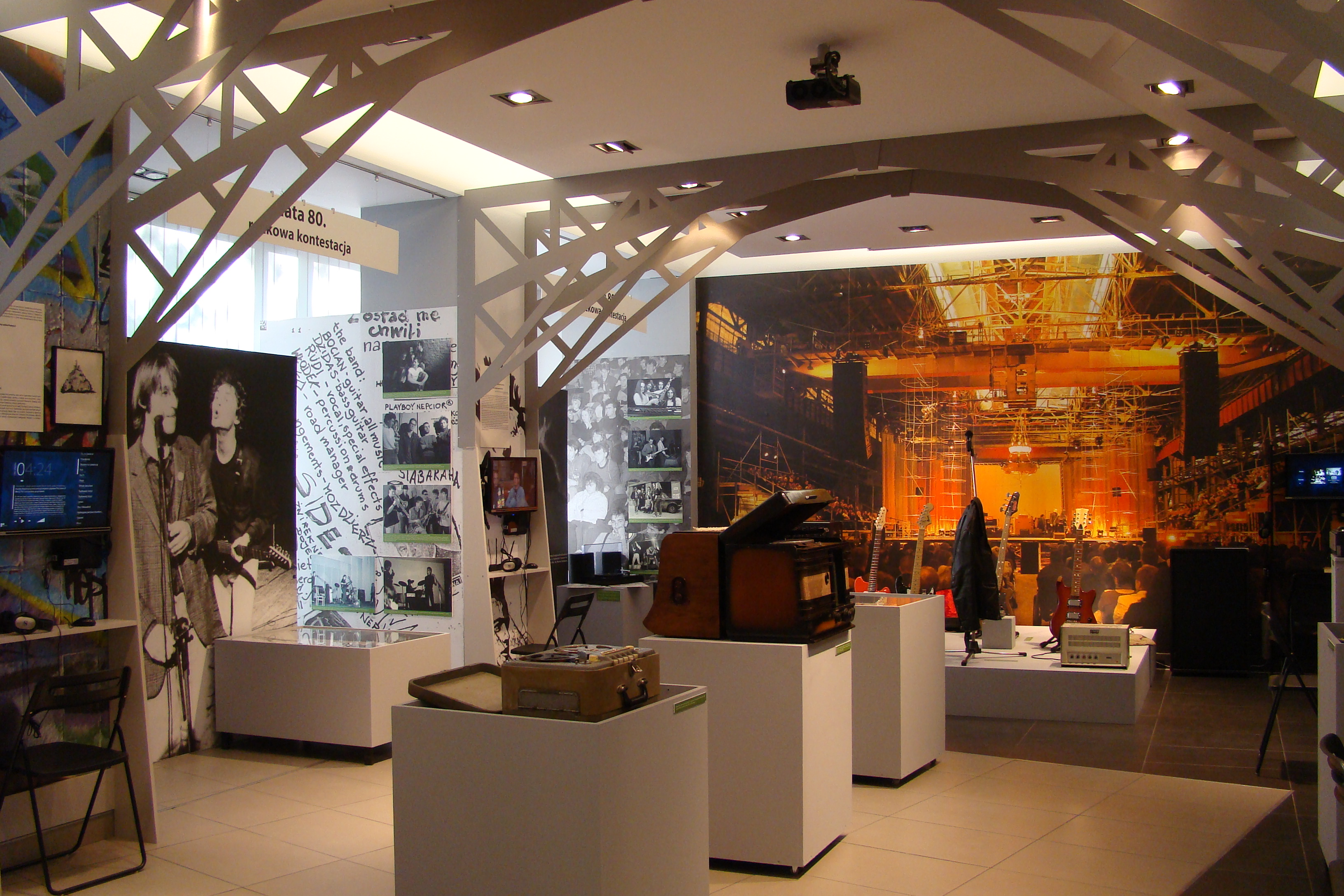 Wystawa "Zagrajmy to jeszcze raz... Muzyka Nowej Huty 1950-2000". Muzeum Historyczne Miasta Krakowa oddział Dzieje Nowej Huty. 12 maja - 2 października 2011, os. Słoneczne 16, Kraków - Nowa Huta